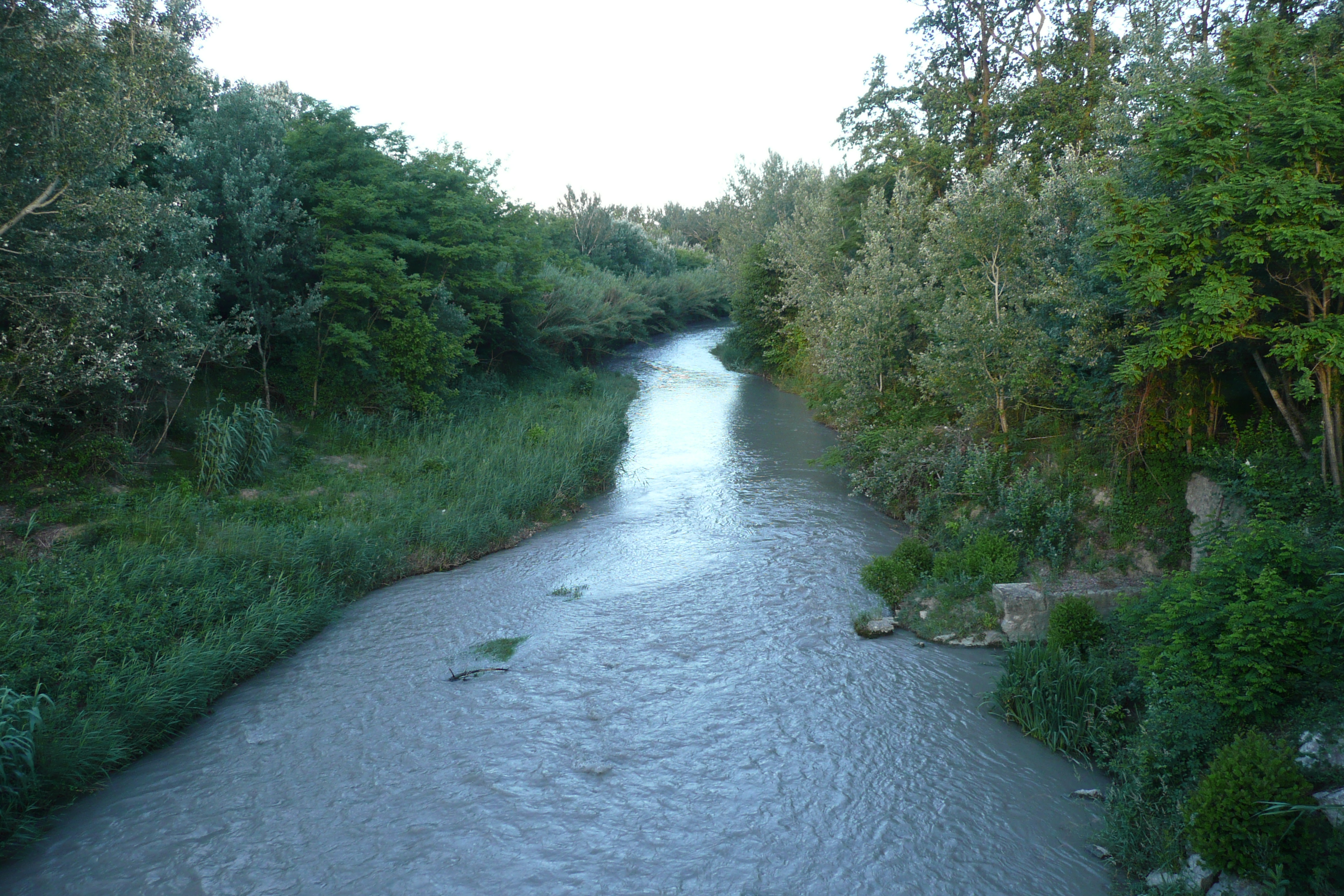 Rivière Cavalon près de Cavaillon.